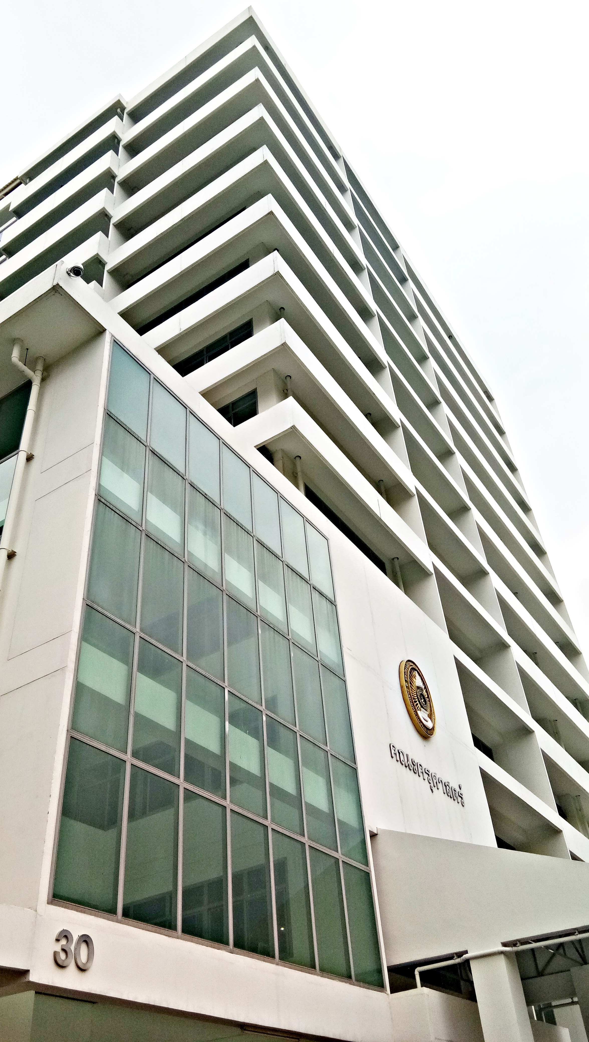 ตึก30 ครุศาสตร์ บ้านสมเด็จ